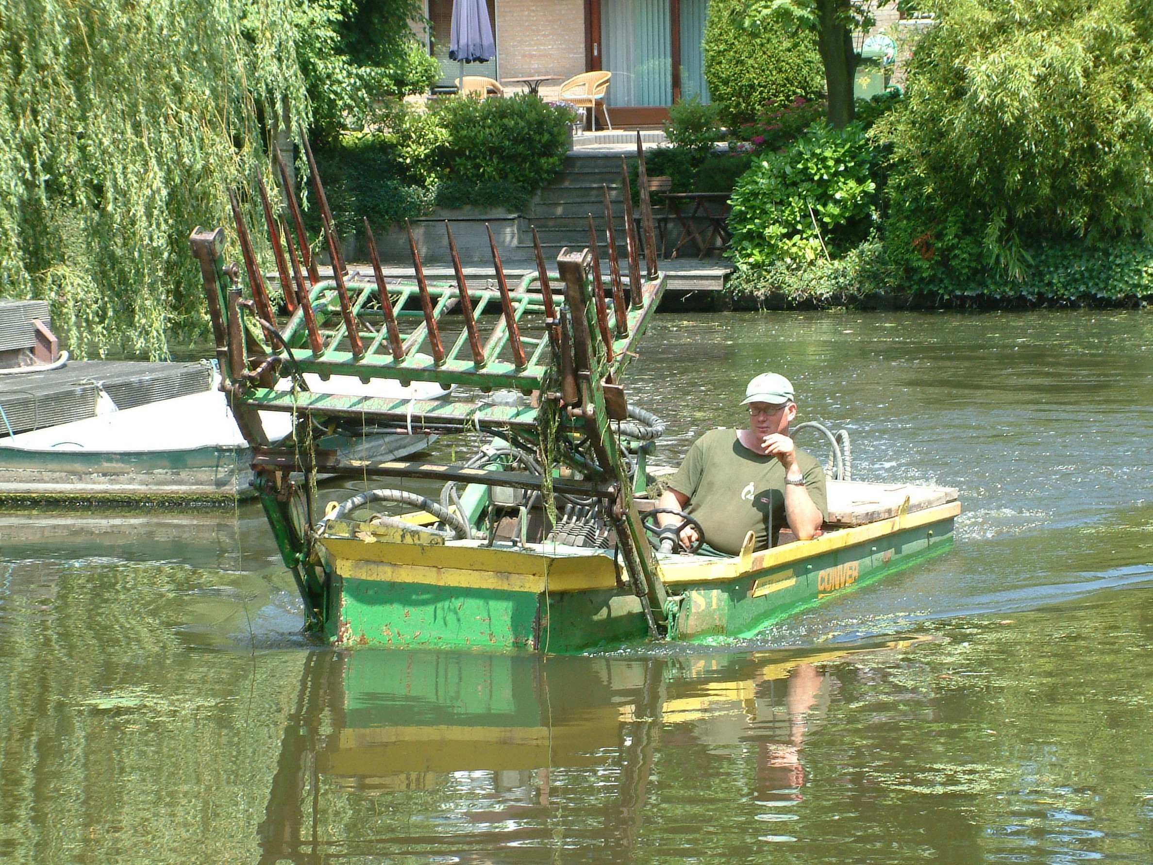 Een maaiboot in een zijsloot van de Broekwegwetering in De Leyens, Zoetermeer